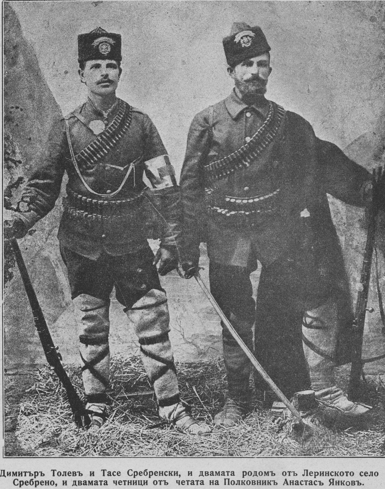 Димитър Толев и Тасе Сребренски.